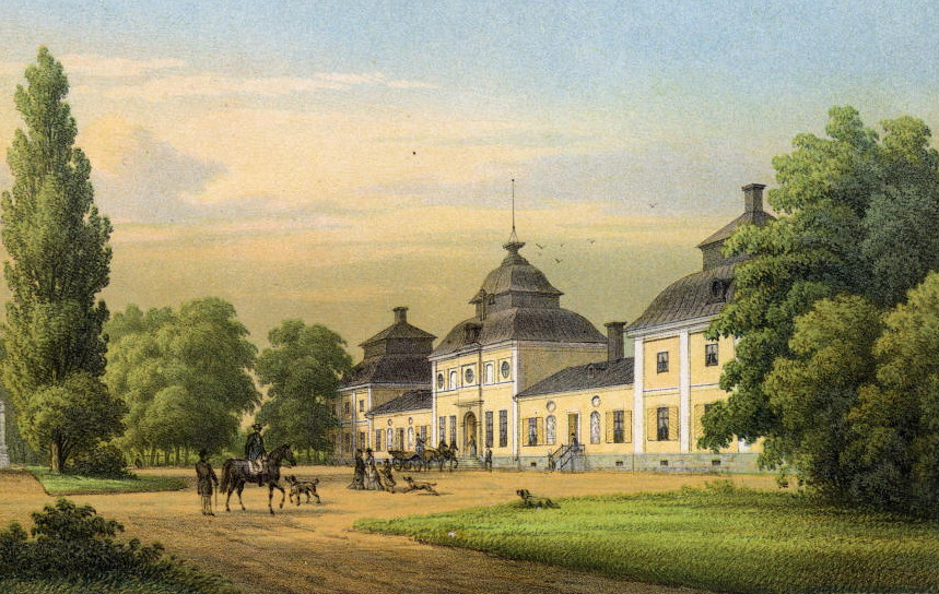 Runsa slott, herrgård i Eds socken i Upplands Väsby kommun, Uppland. Litografi av Alexander Nay. Från verket "Uplands Herregårdar" (1881), Klingspor & Schlegel.